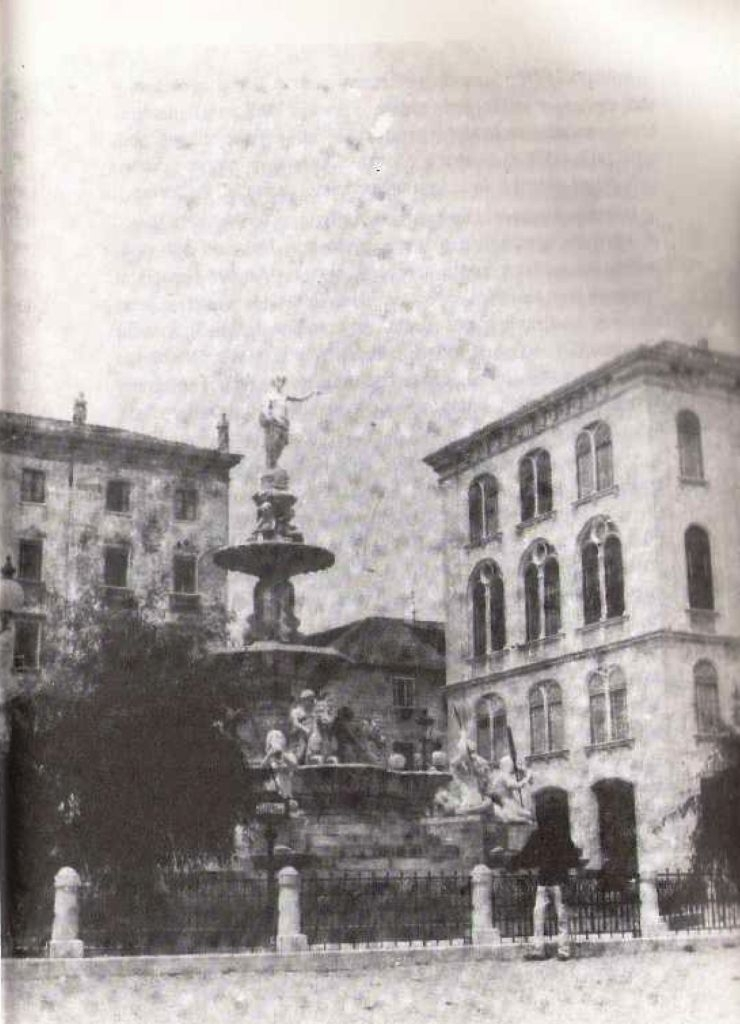 Monumentalna fontana na splitskoj rivi